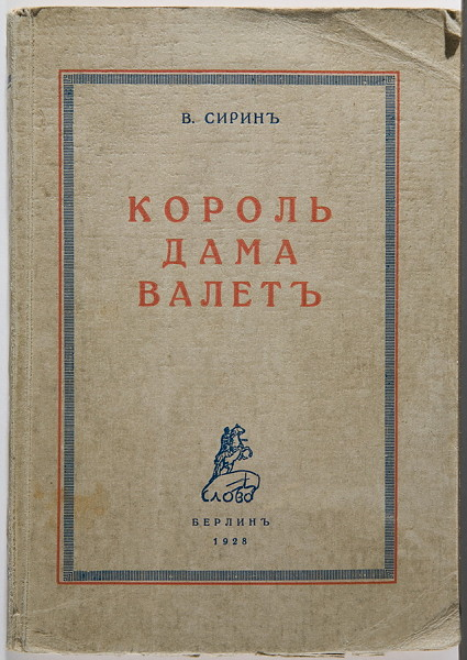 Король, дама, валет (обложка 1 издания книги В. Набокова)